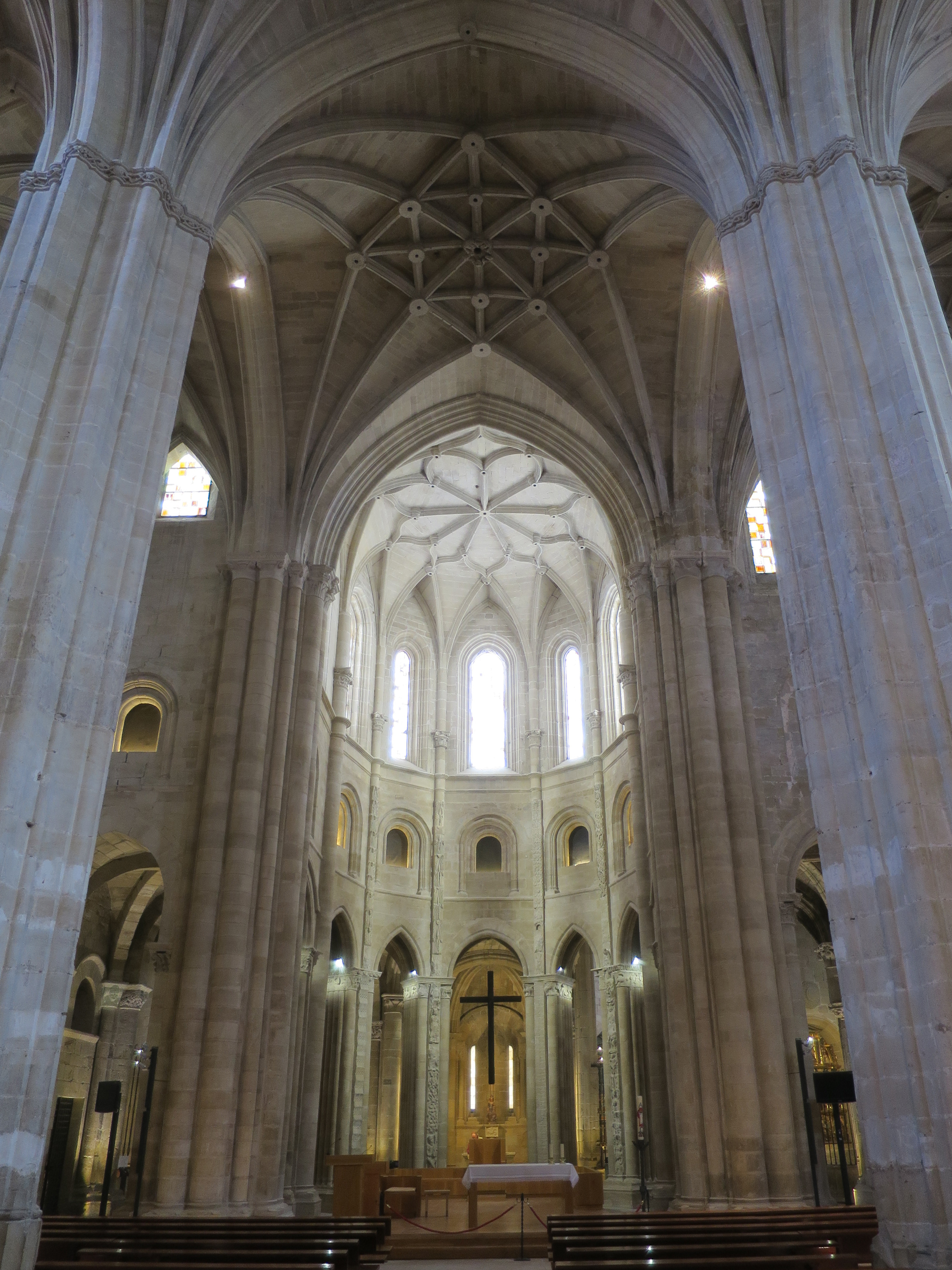 Mittelschiff und Chor der Kathedrale Santo Domingo de la Calzada